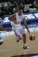 Immagine rilasciata dal proprietario della stessa, pallacanestro Varese